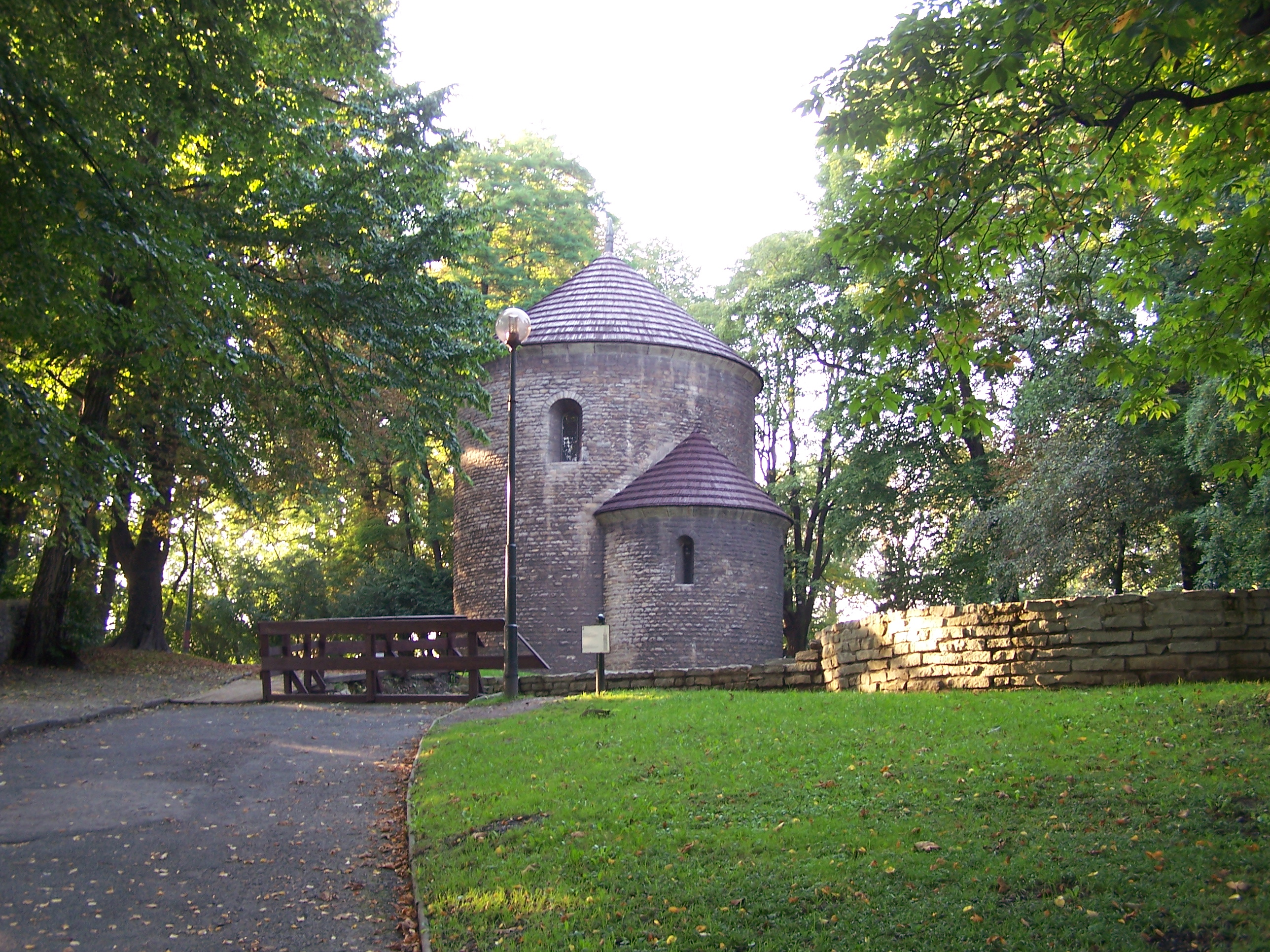 Saint Nicolas Rotunda (Rotunda św. Mikołaja) in Cieszyn, Poland